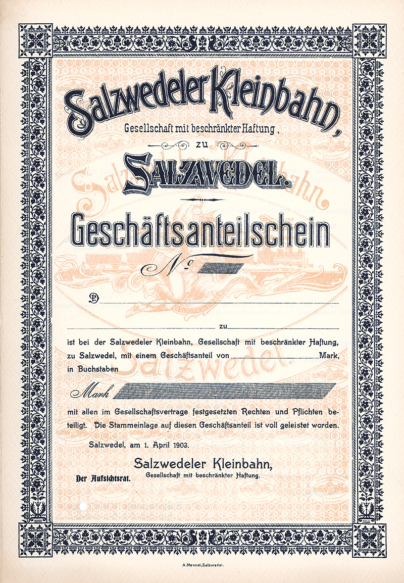 Blankette eines Geschäftsanteilschein der Salzwedeler Kleinbahn GmbH vom 1. April 1903